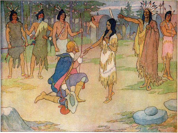 Pocahontas, 1906, par Elmer Boyd Smith.